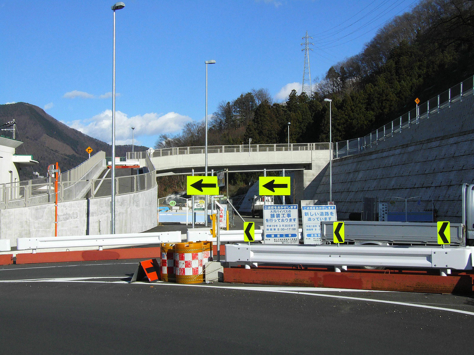 Ōtsuki Bypass at Otsuku, Yamanashi, Ōtsuki. Yamanashi prefecture, Japan.